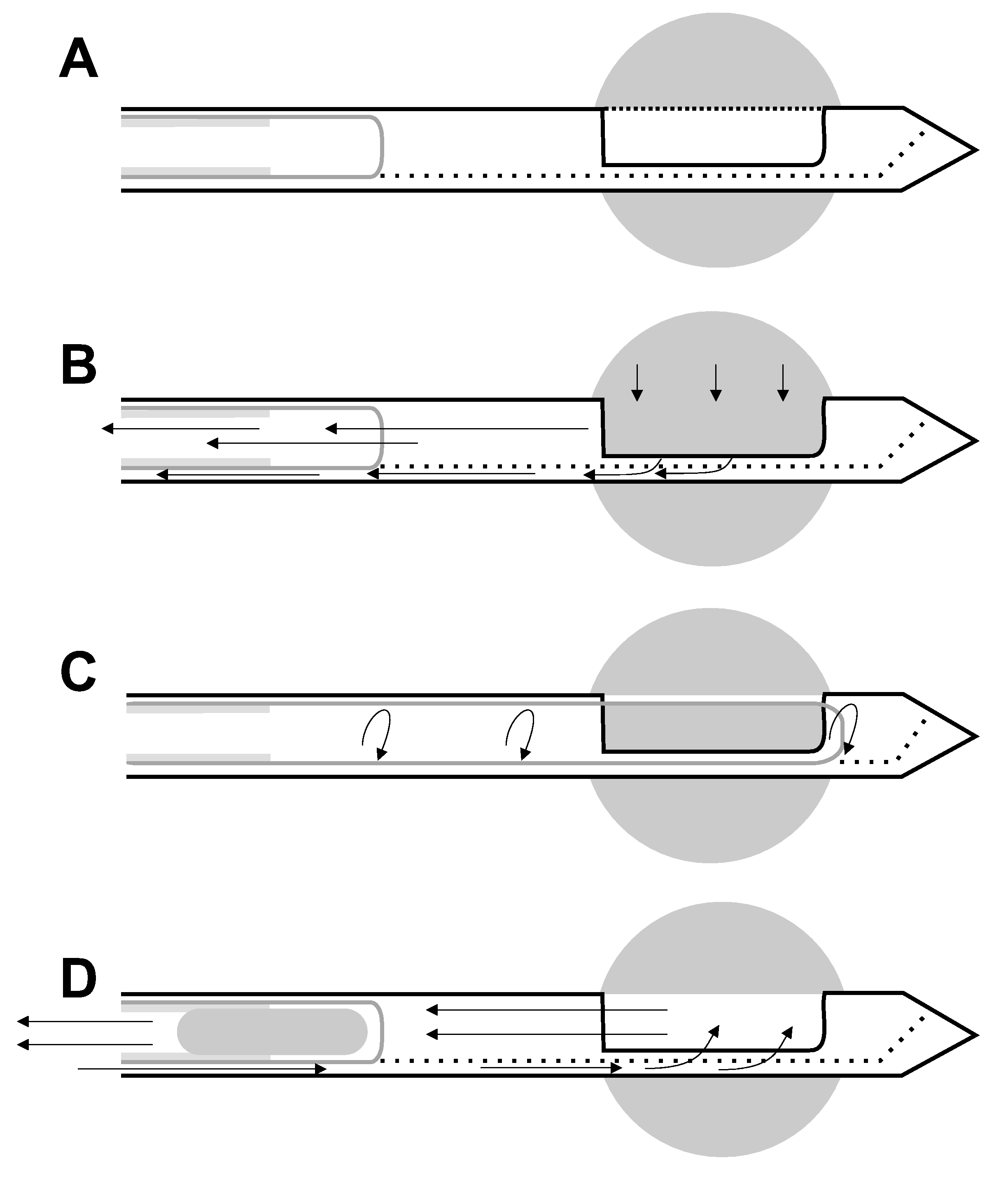 Vorgang der Vakuumbiopsie